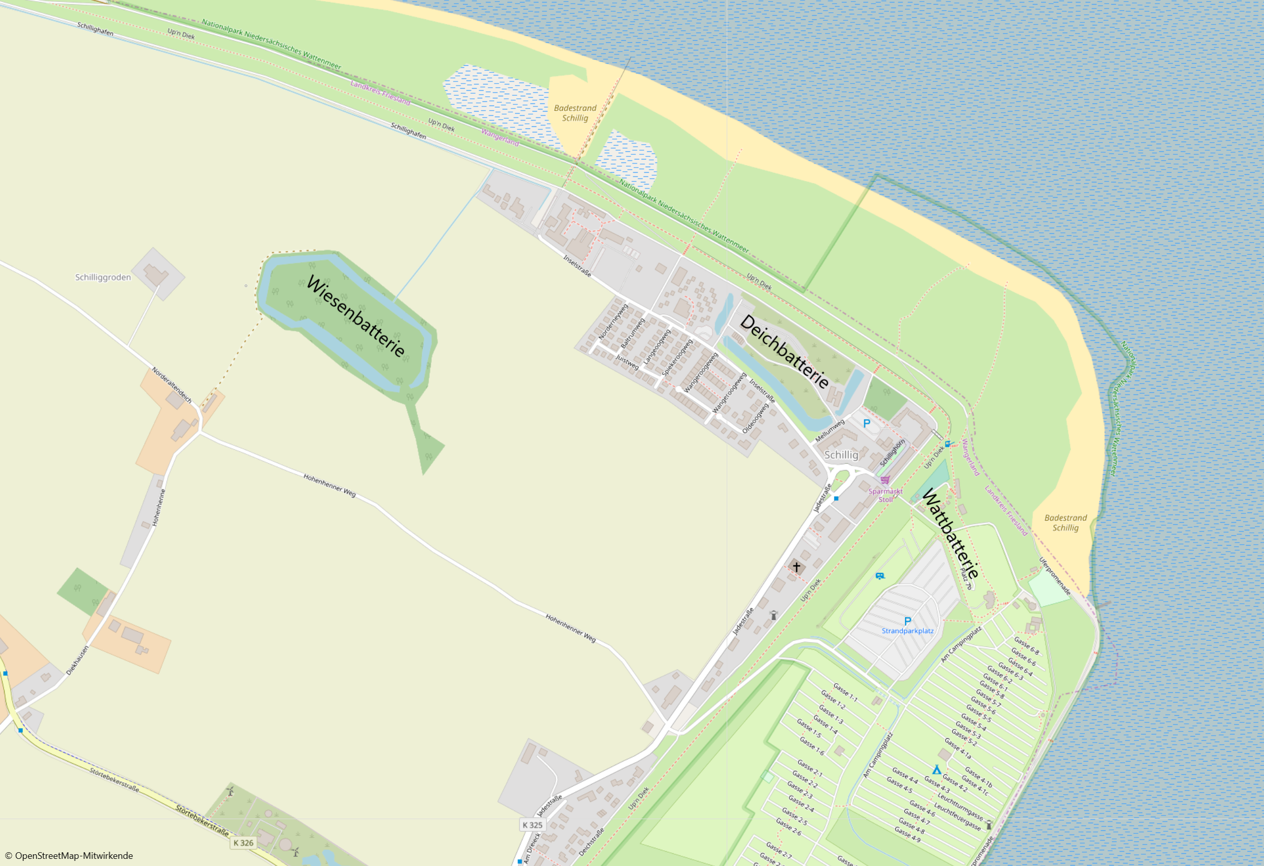 Karte von Schillig, Lage der ehemaligen Küstenforts ist eingezeichnet